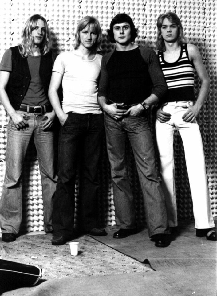 Den esbjergensisk rockgruppe "Bad Mama". Kenneth Luciani som forsanger 2. th.